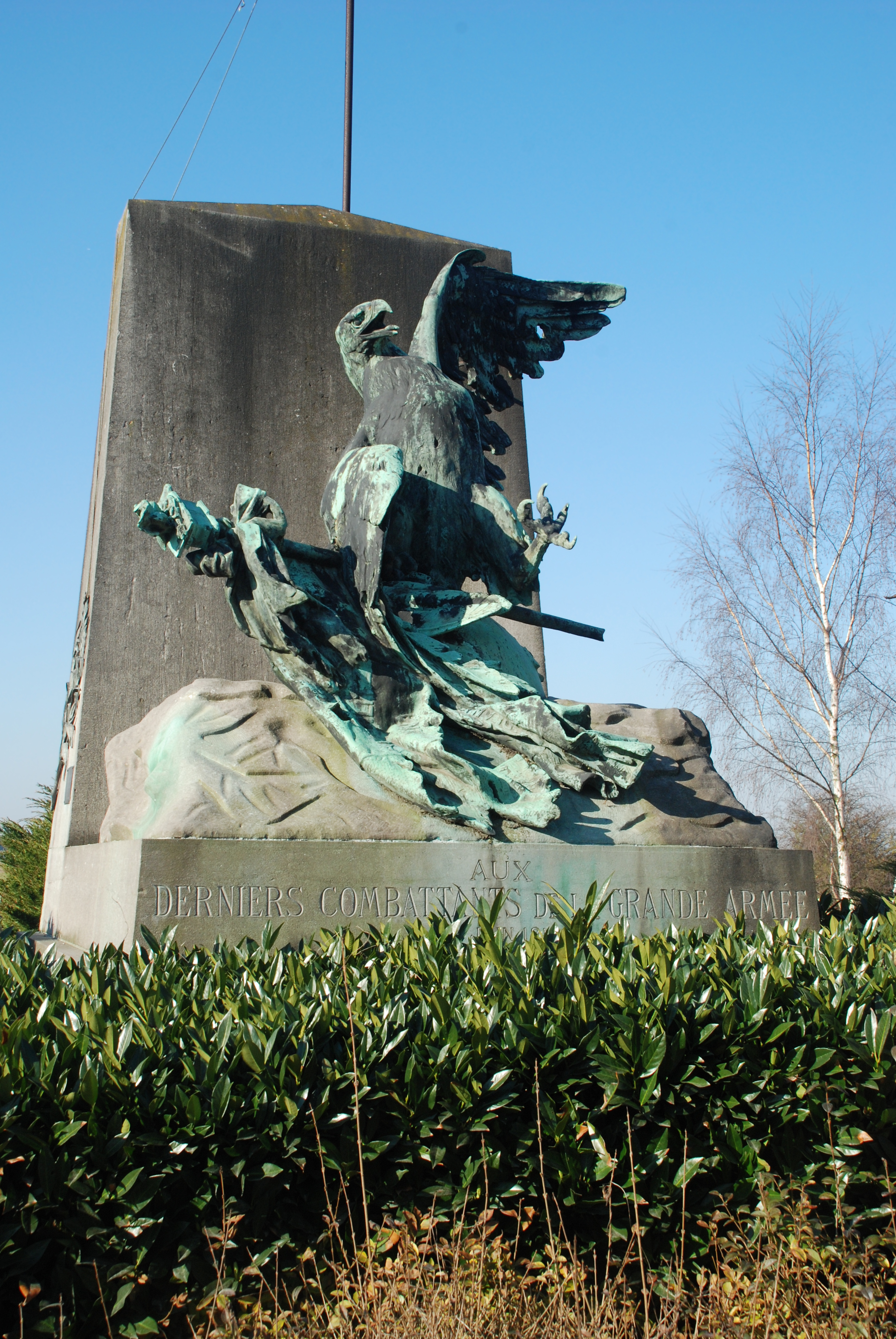 Belgique - Brabant wallon - Lasne - Plancenoit - L'Aigle blessé (bataille de Waterloo)